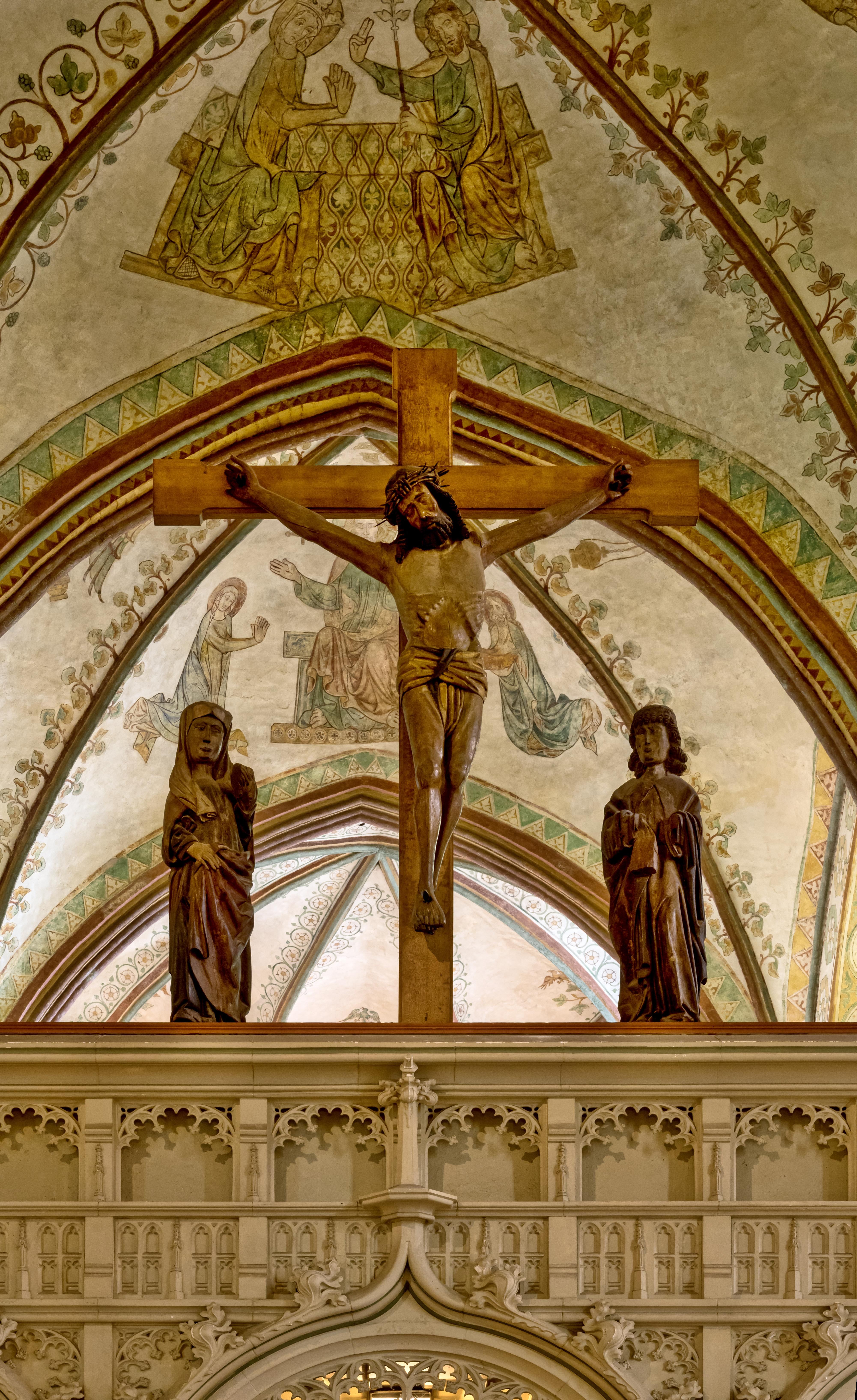 Bilder aus Schleswig Bilder aus dem Inneren Bilder vom Dom St. Petri in Schleswig